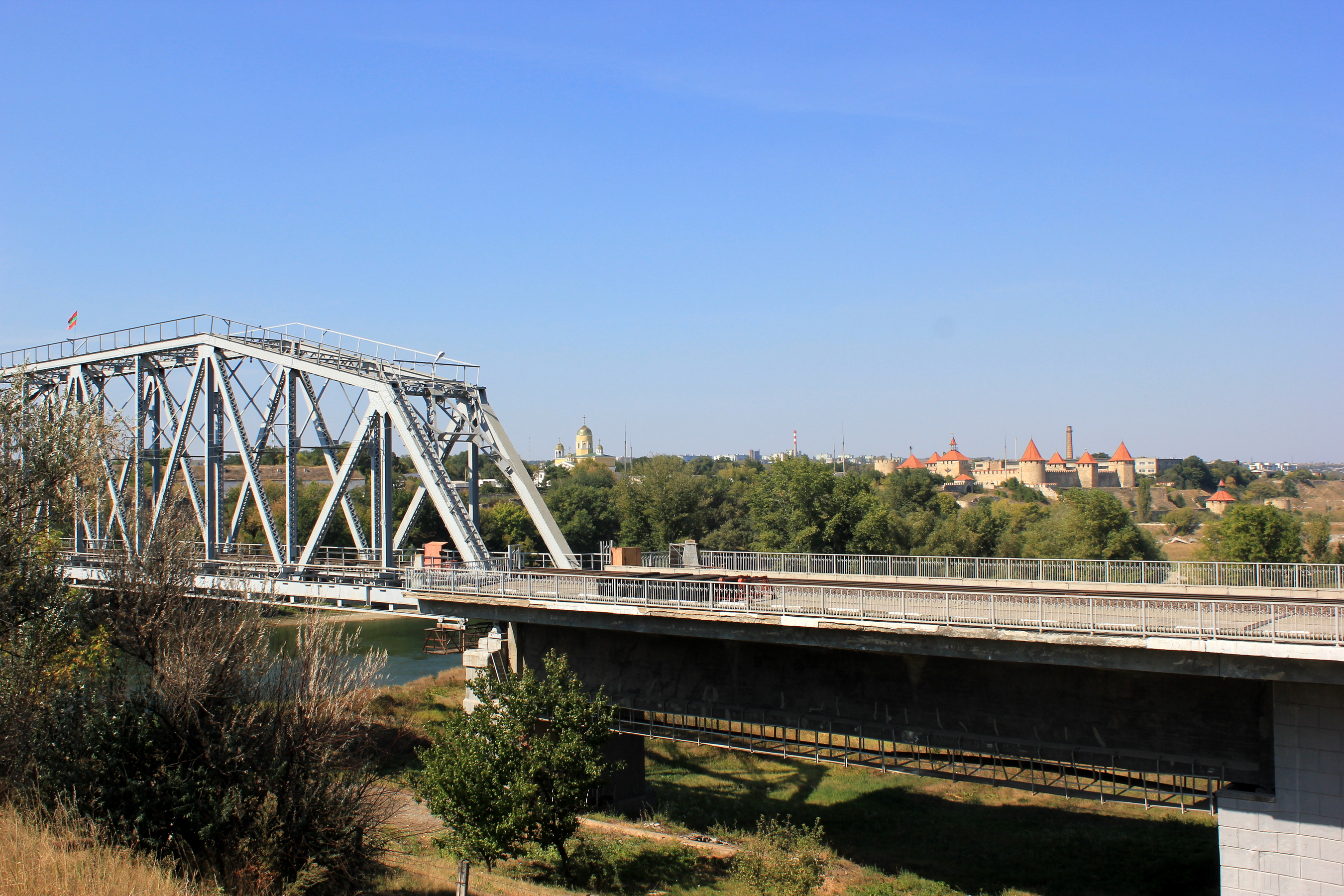 Bahnbrücke über den Dnister in Bender, Transnistrien. Im Hintergrund die Festung.